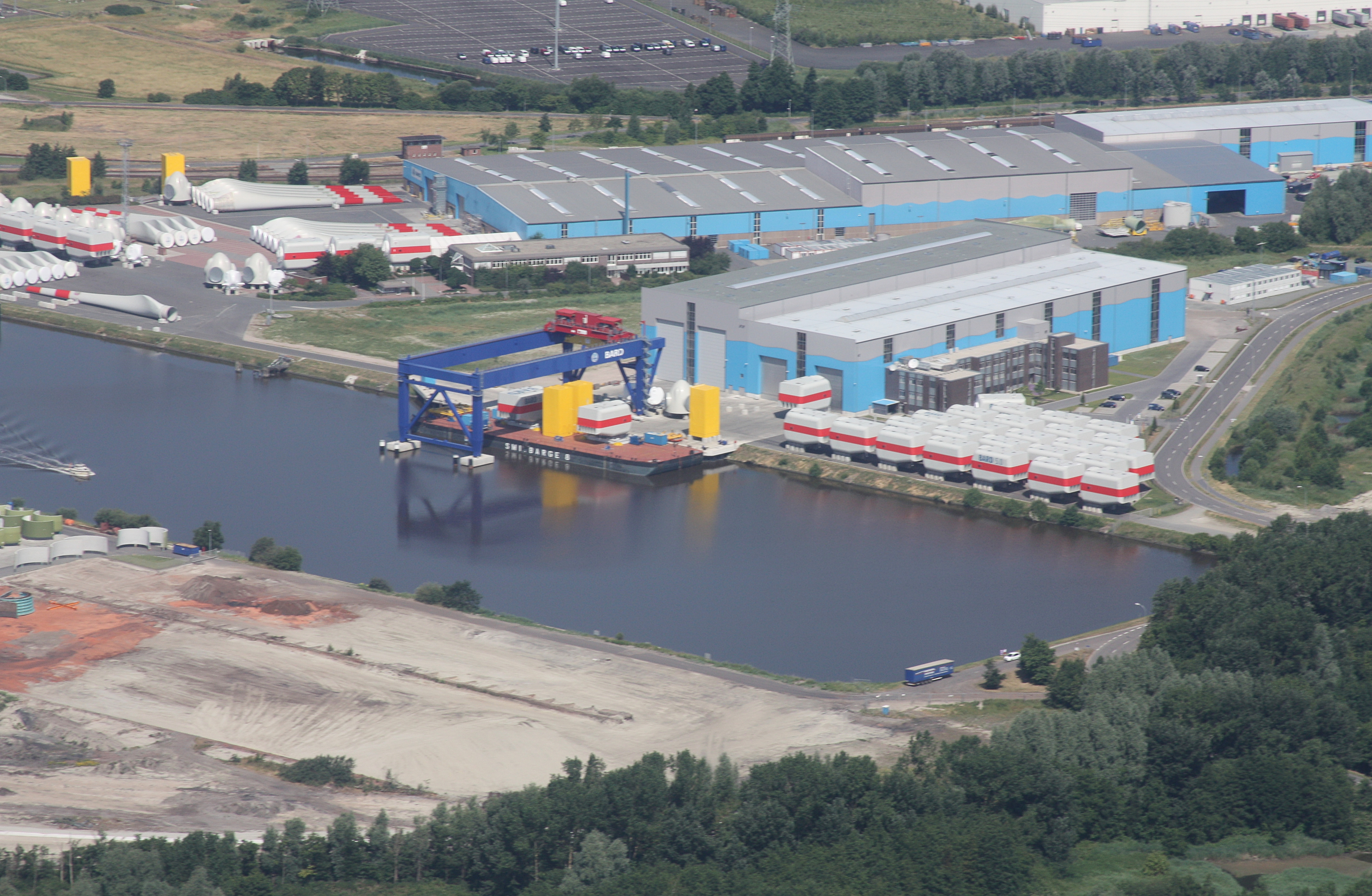 Flug über Emden; Flughöhe 1500 ft; Juli 2010; Originalfoto bearbeitet: Tonwertkorrektur und Bild geschärft mit Hochpassfilter